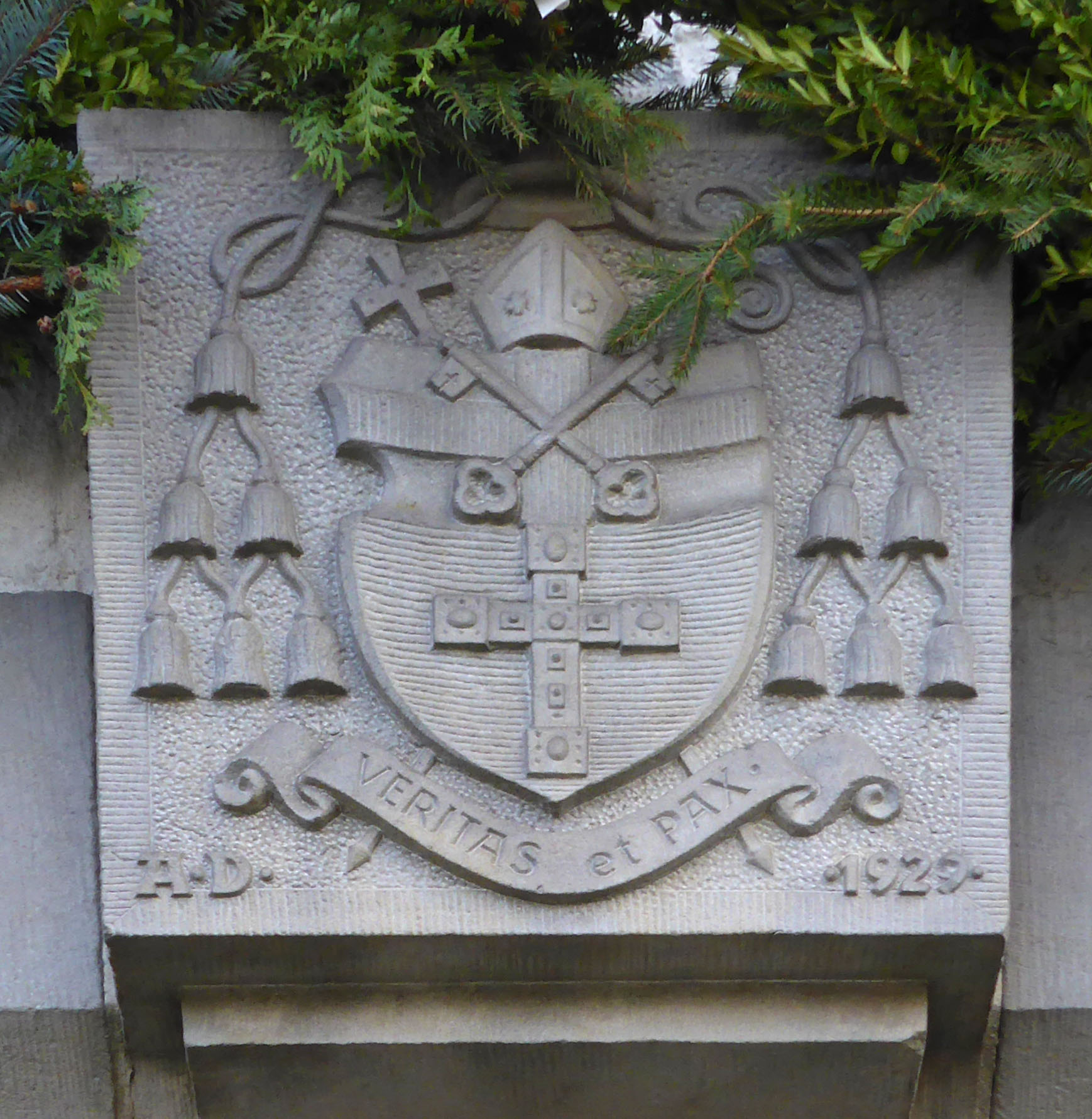 Wappen von Bischof Nikolaus Bares an der katholischen Kirche in Velpke.